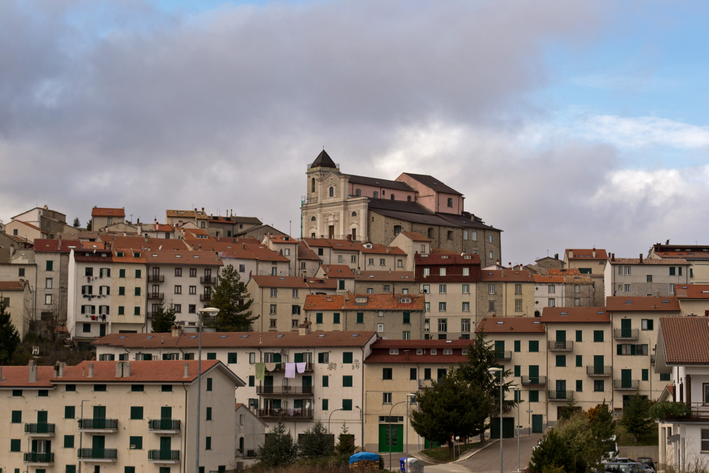 Capracotta, in provincia di Isernia